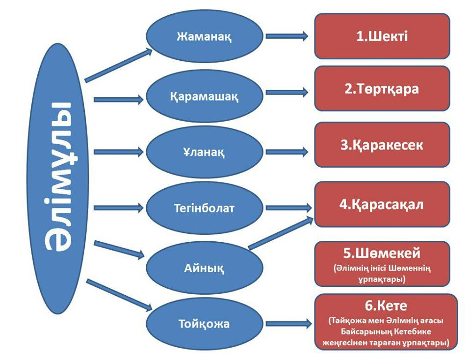 Әлімұлы рулары